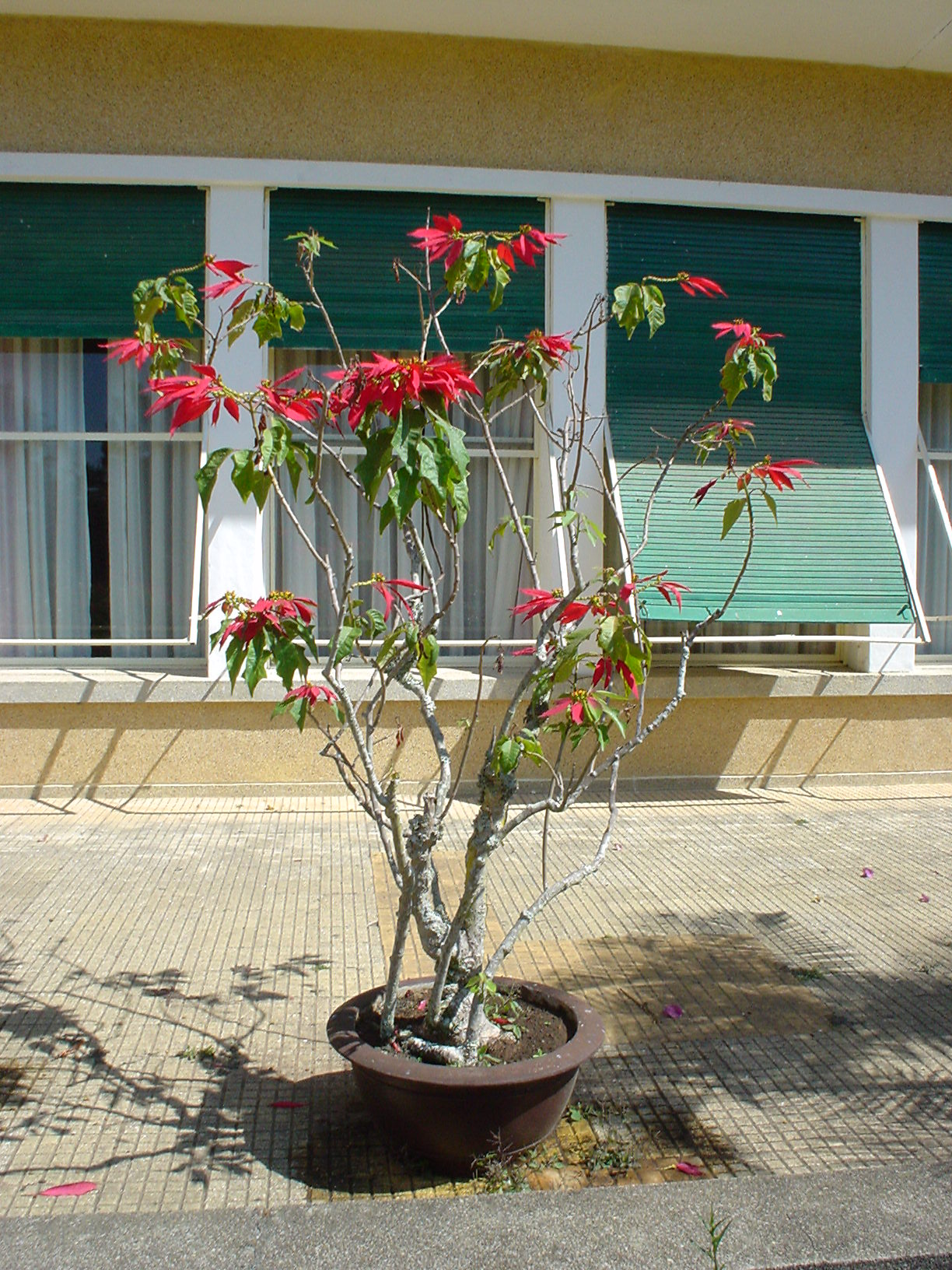 Hoa Trạng nguyên(Euphorbia pulcherrima)Họ Thàu dàu(Euphorbiaceae)